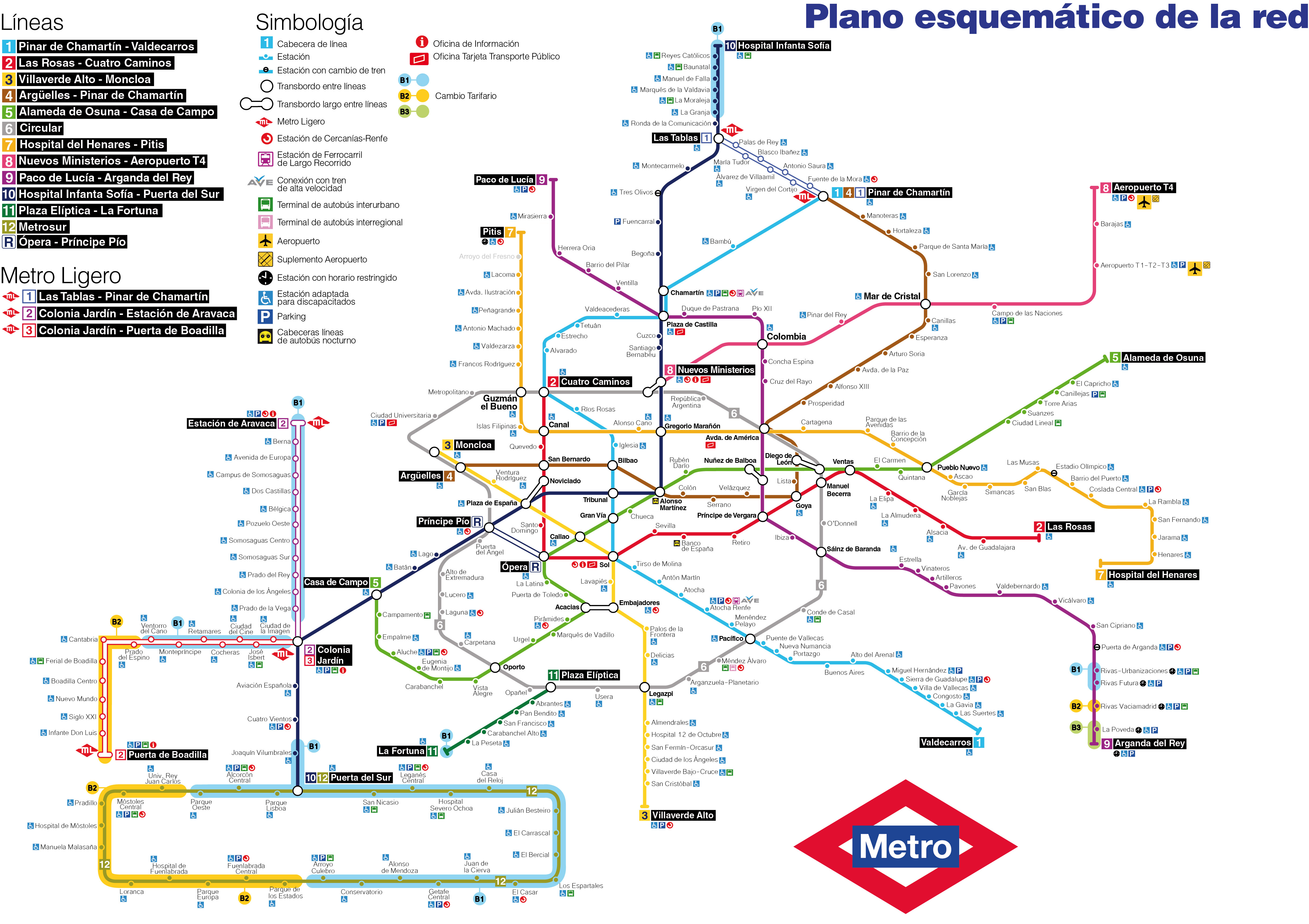 Mapa esquemático de la red de metro de Madrid, realizado siguiendo los parámetros estéticos del plano antiguo pero añadiendo todos los nuevos tramos de la red.